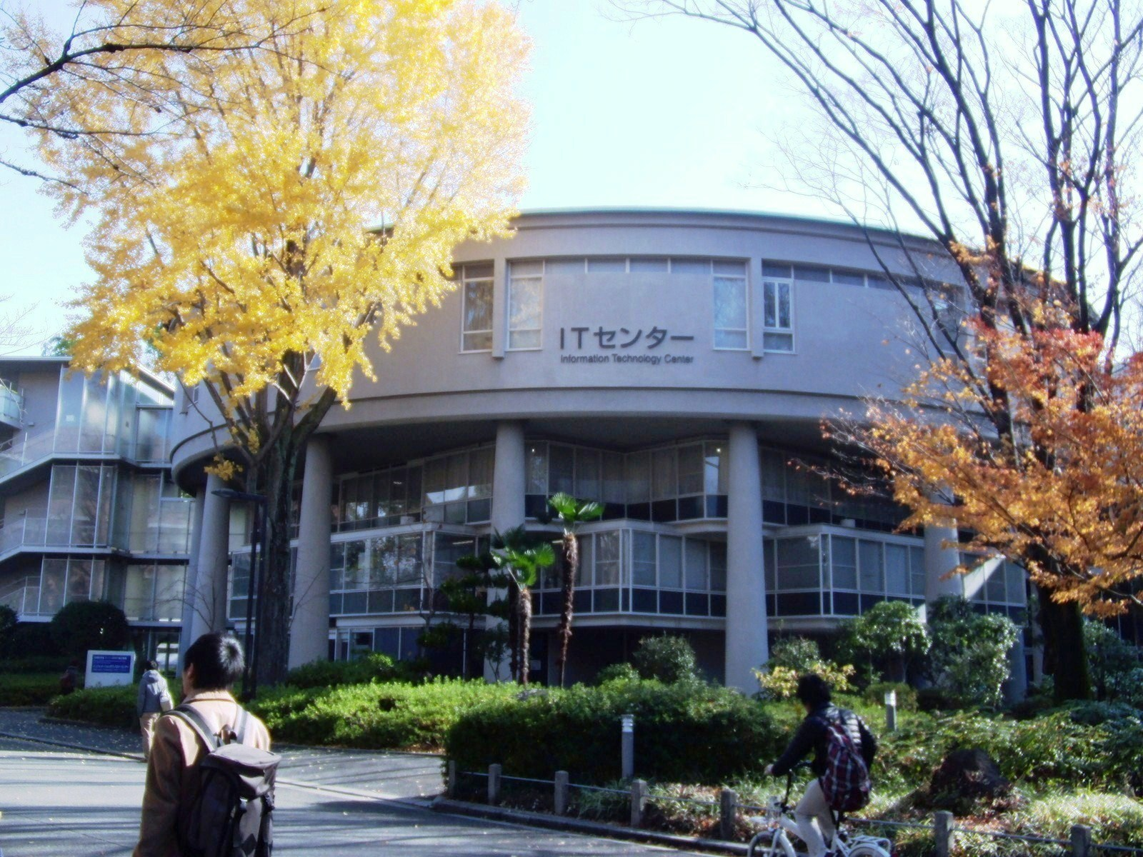 関西大学千里山キャンパス内にあるITセンターを撮影。